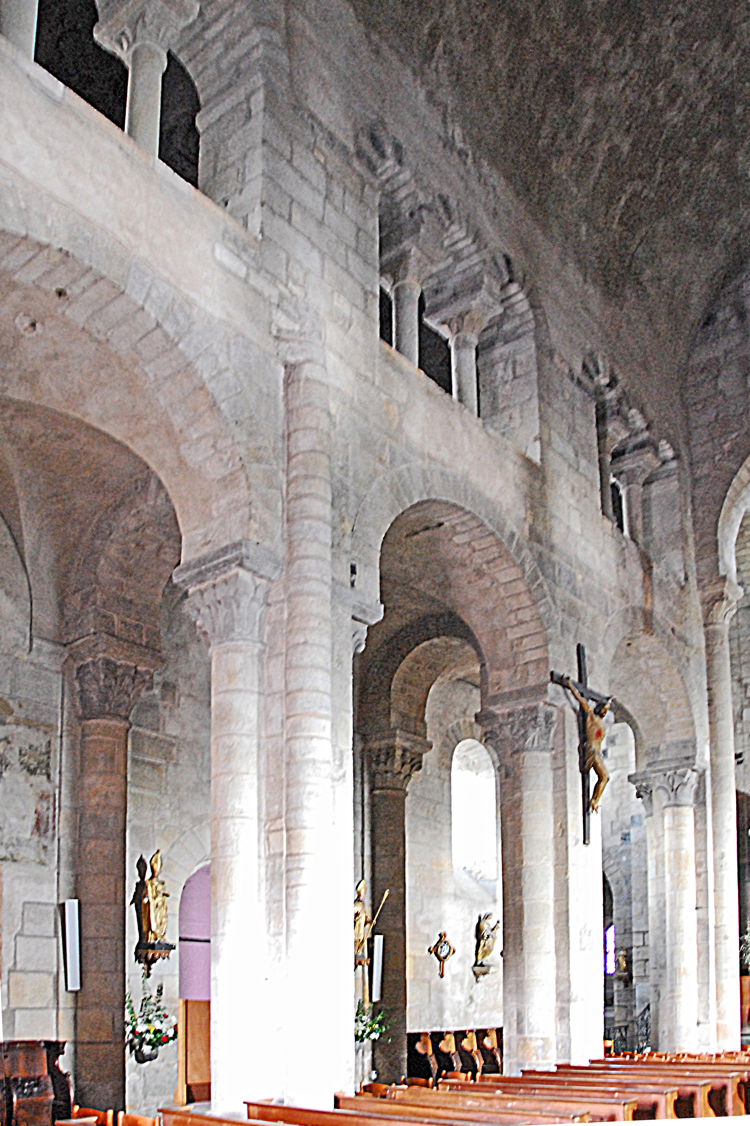 St-Saturnin Puy-de-Dôme), Mittelschiff, Nordwand, Joche 2-4